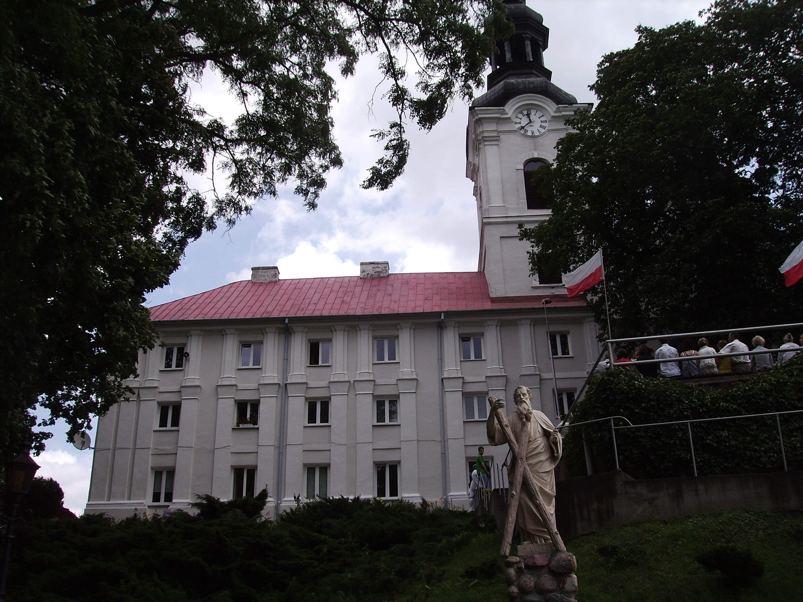 Kościół w miejscowości Obory (powiat golubsko-dobrzyński)